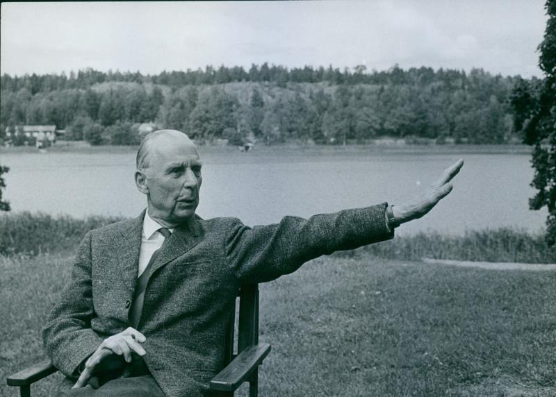 Foto av Carl Bernadotte af Wisborg infört i Svenska Dagbladet 1964-08-12 s. 20 och 1977-04-24 s. 16.